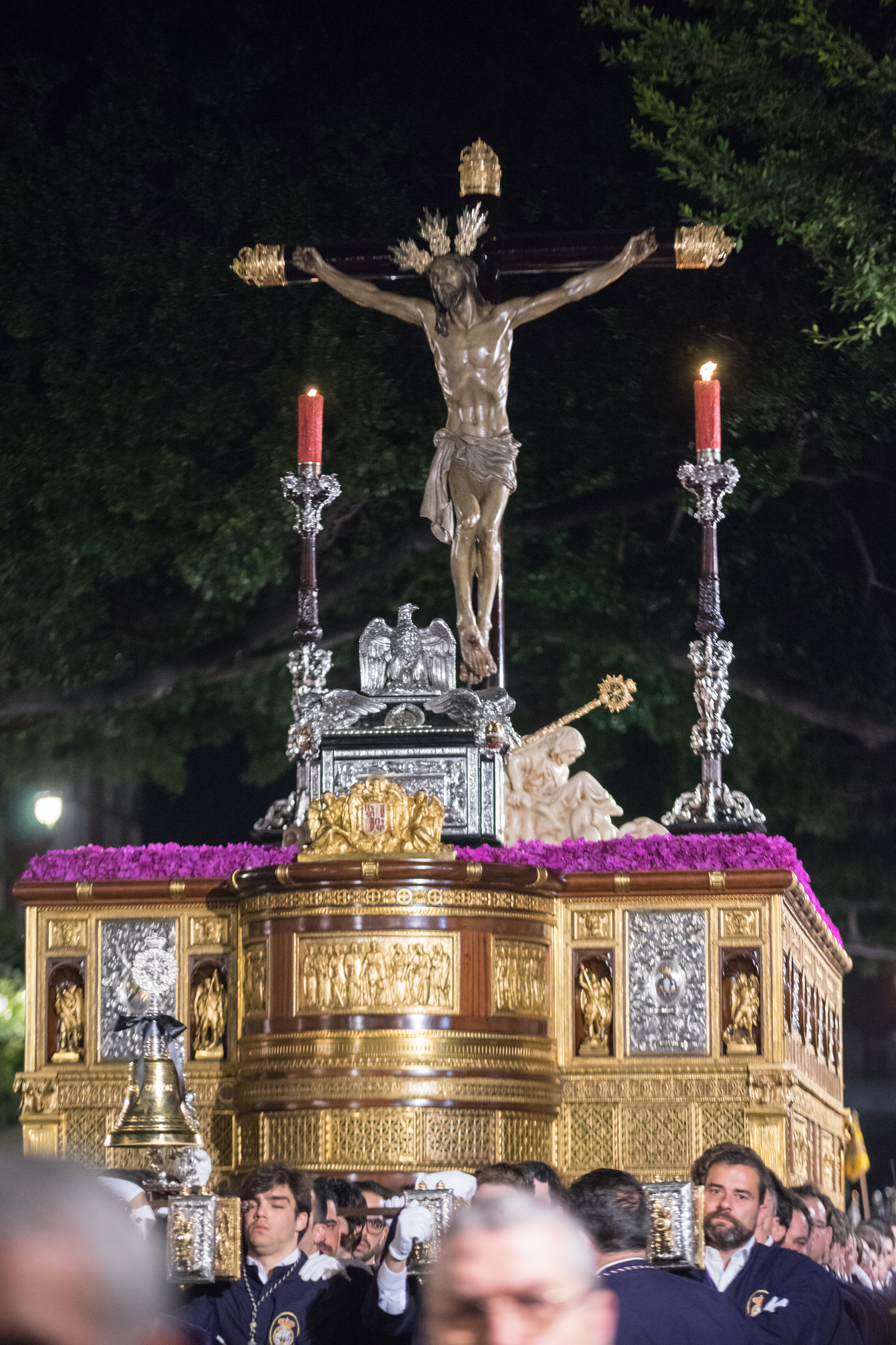 Pontificia, Real, Ilustre y Venerable Archicofradía Sacramental de Culto y Procesión del Santísimo Cristo de la Expiración y María Santísima de los Dolores Coronada This is a photography of a Folklore festival in Spain (Wikidata id Q9075883).